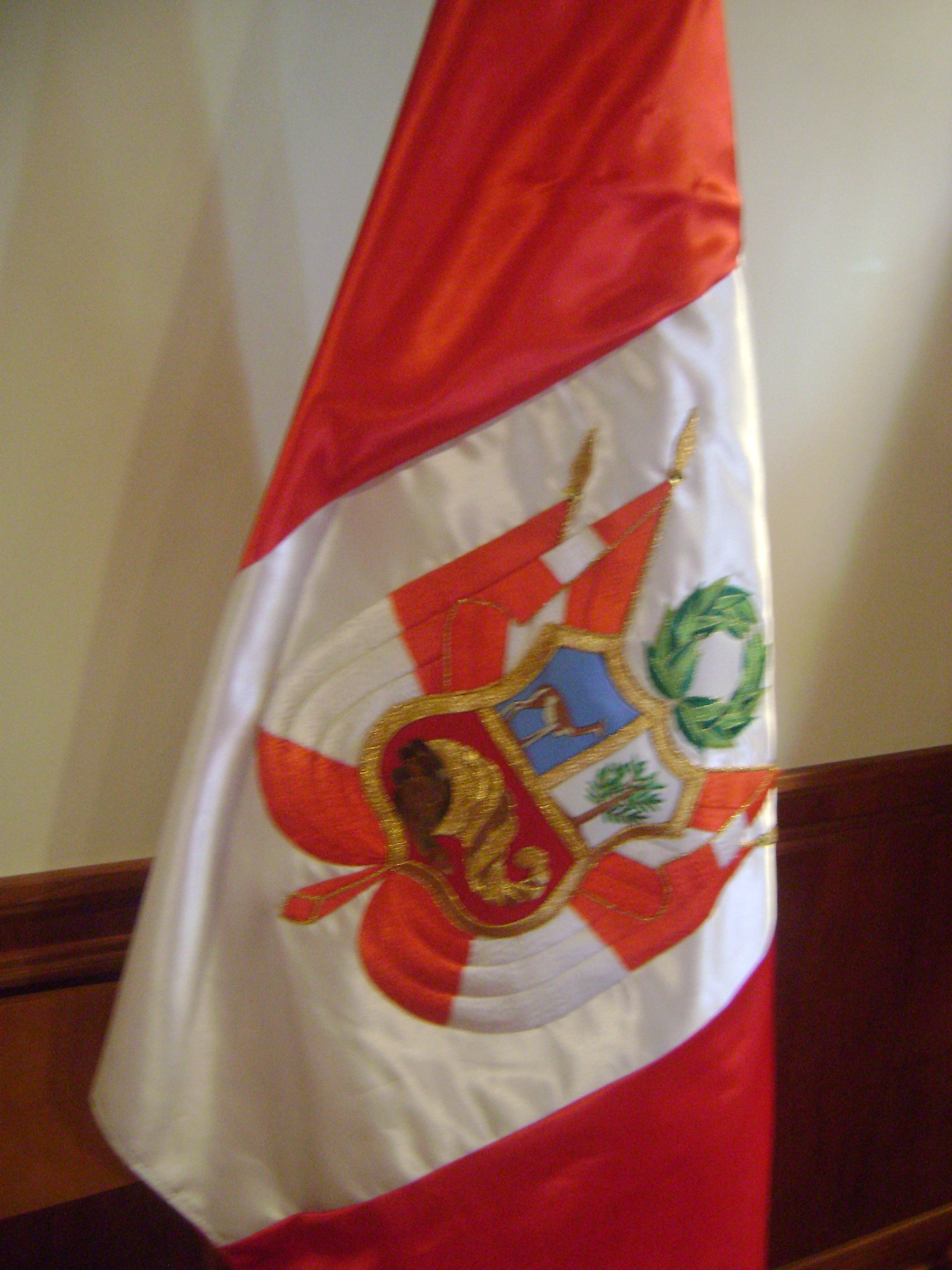 Bandera del Perú